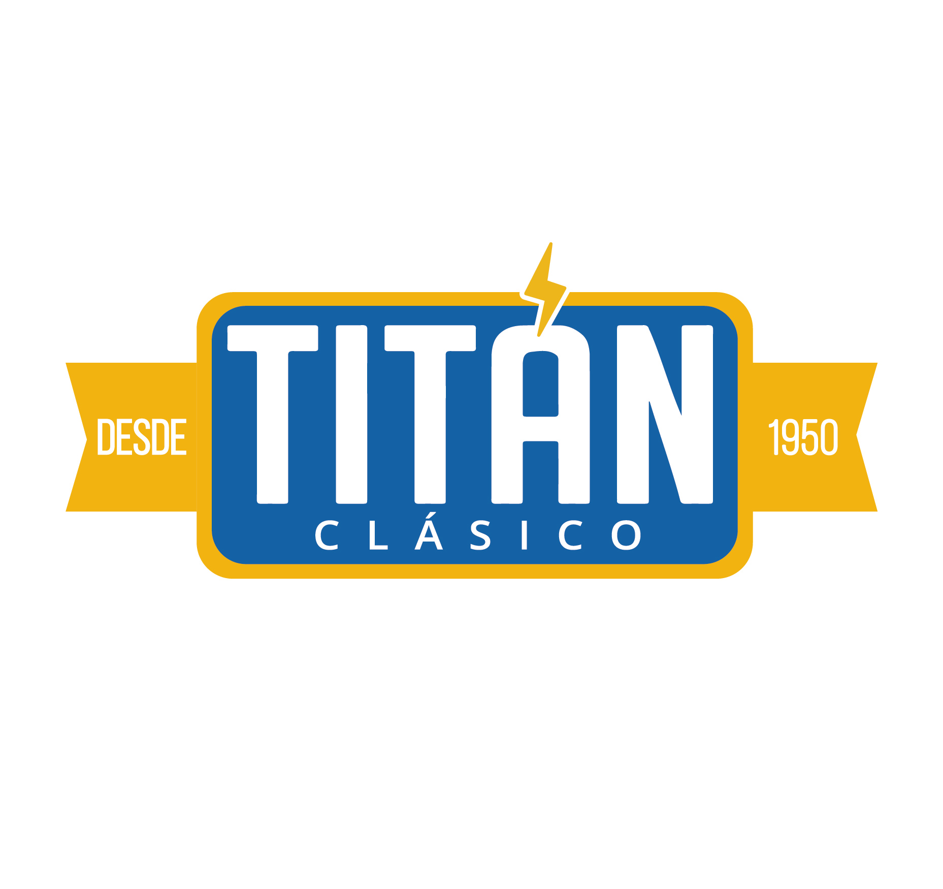 Logo Titan